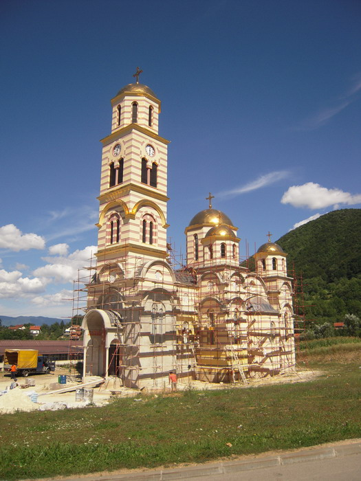 Izgradnja crkve u Mrkonjić Gradu